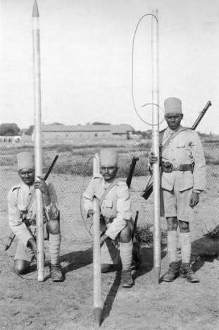 Três soldados da Madras Engineer Group (Madras Sappers), cada um segurando um Torpedo de Bangalore, foto de 1916